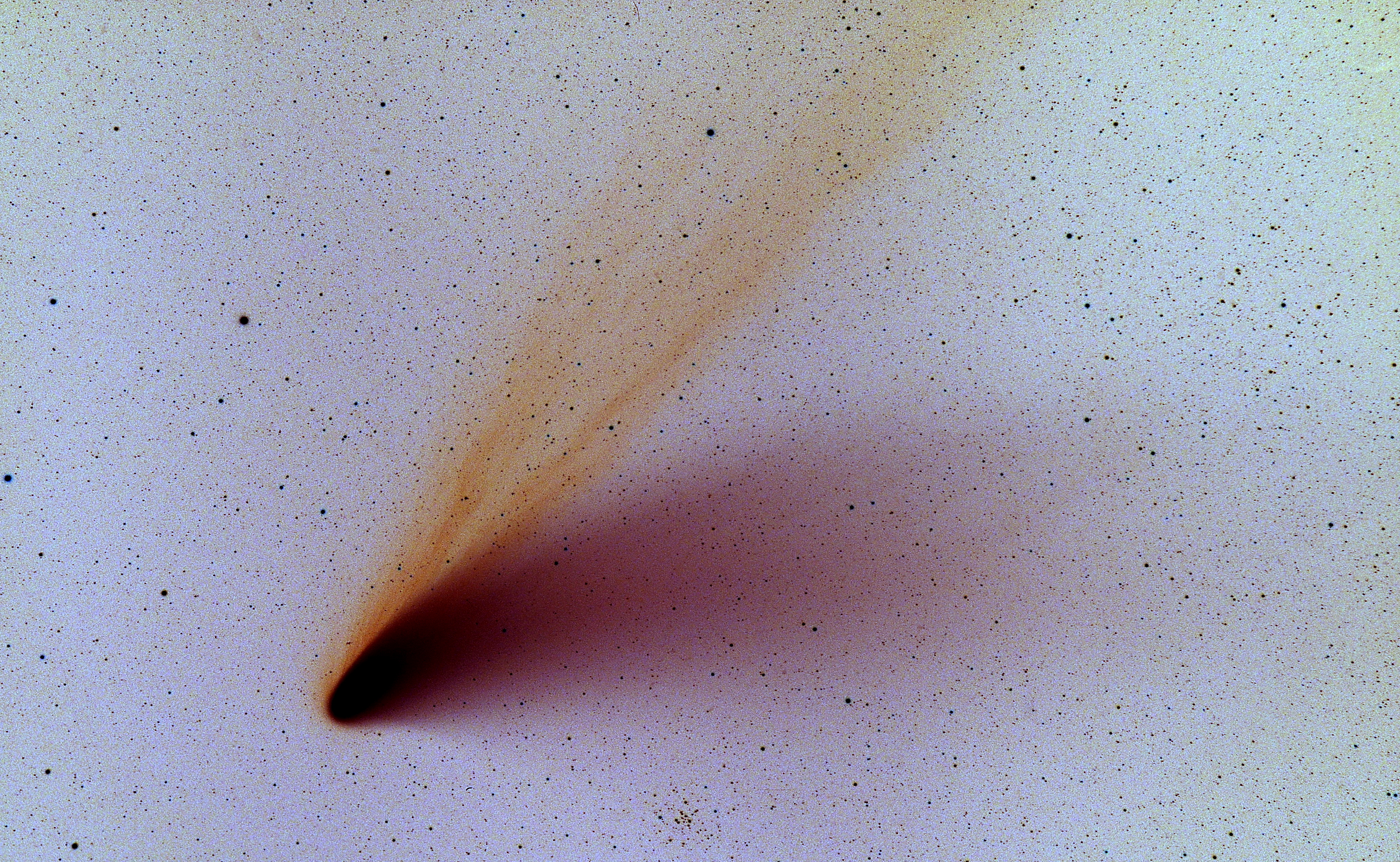 Comet Hale-Bopp, negative